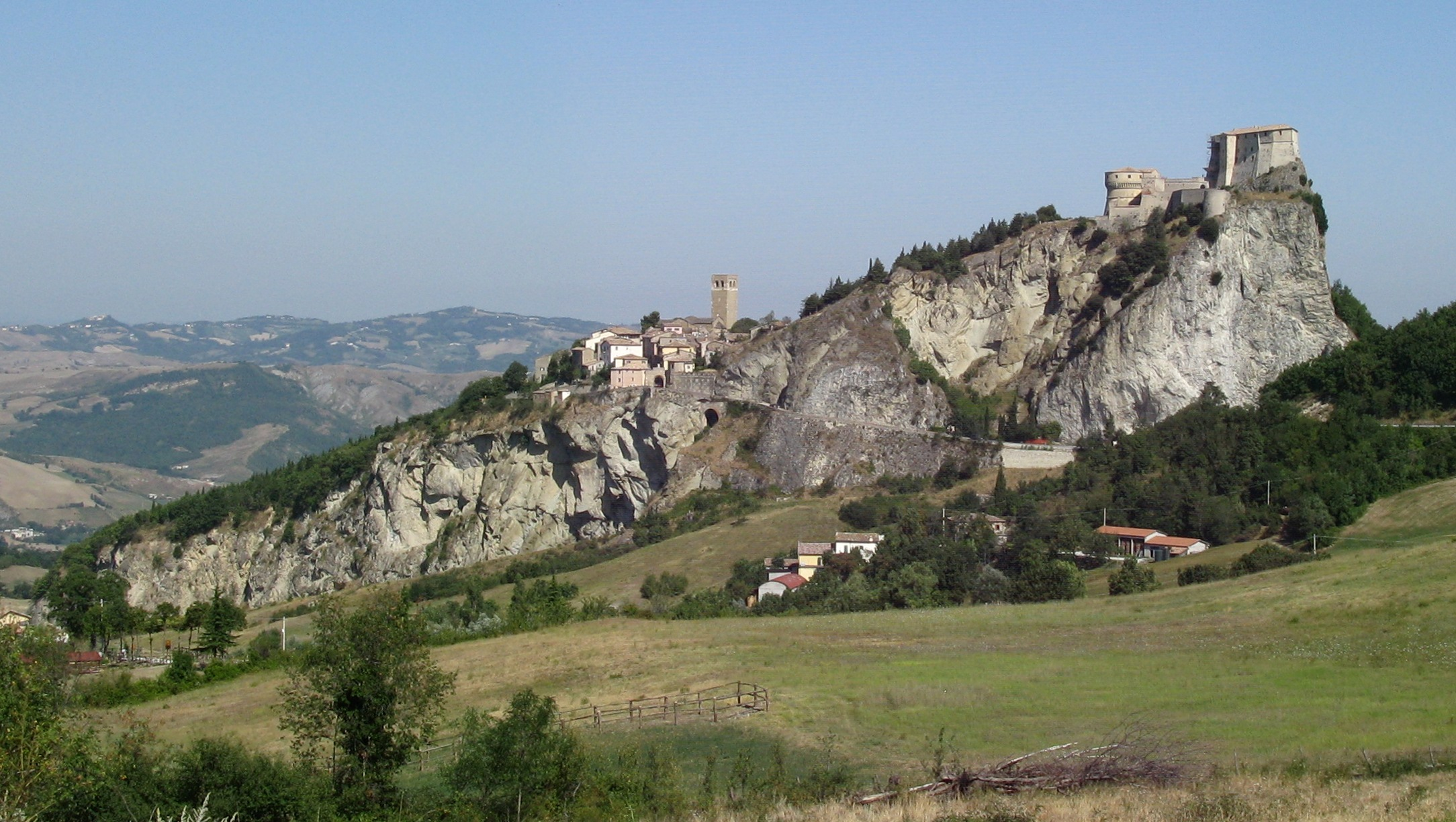 Panorama di San Leo.